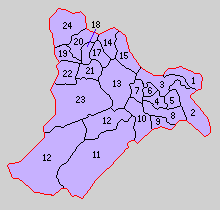 神奈川県津久井郡の村。